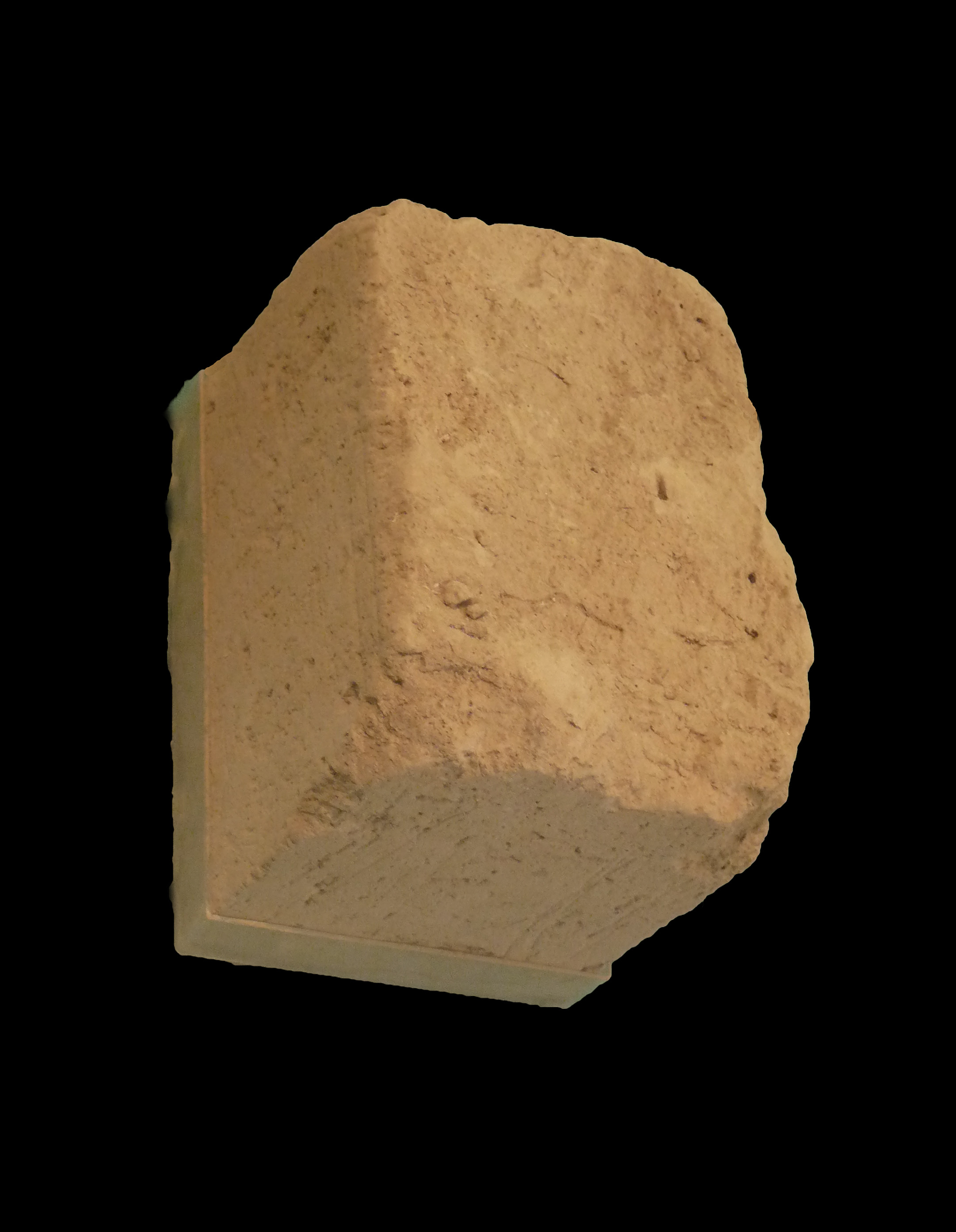 Echantillon de loess (Eguisheim) au Musée d'histoire naturelle et d'ethnographie de Colmar